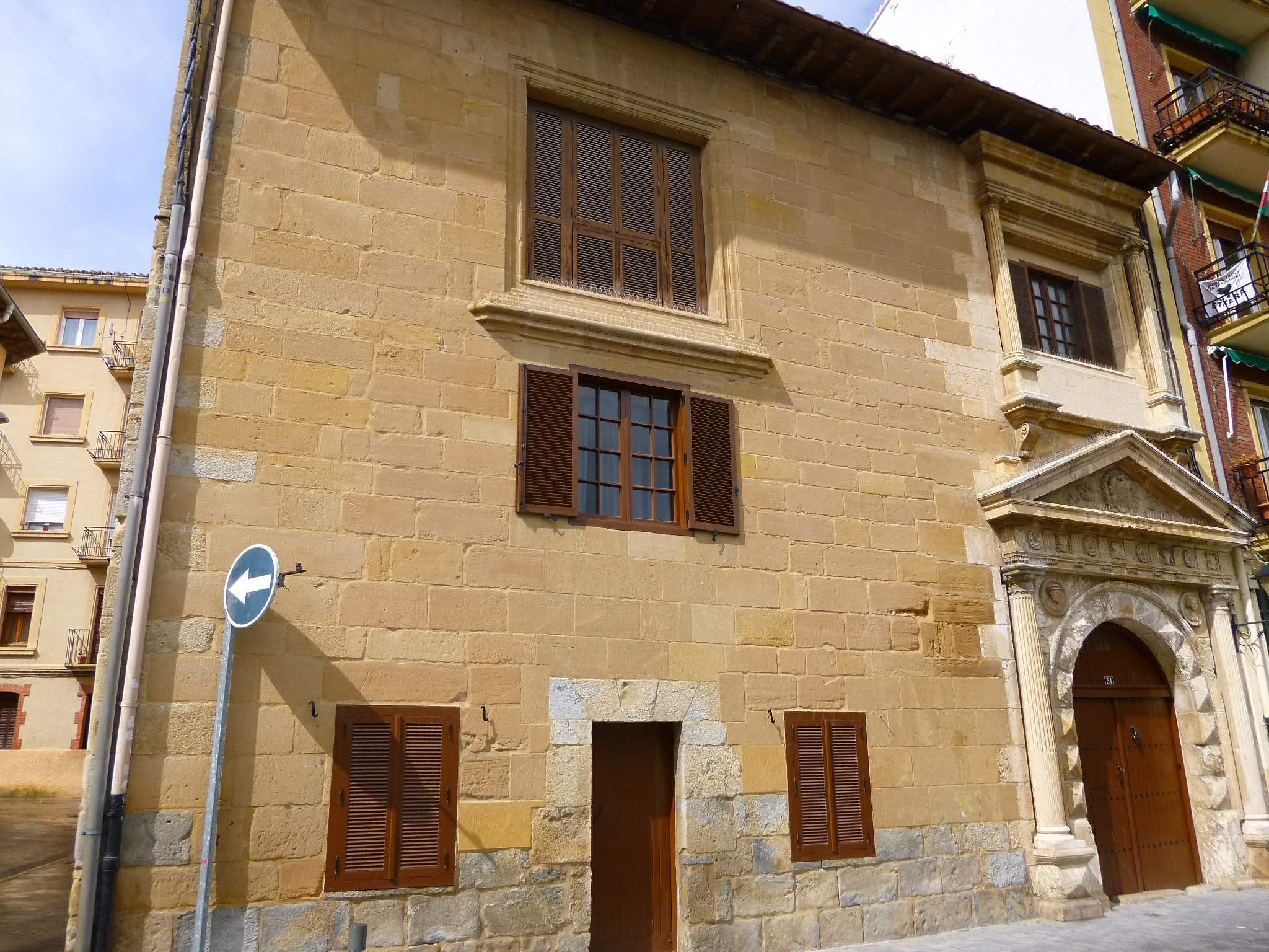 Villava (Navarra)